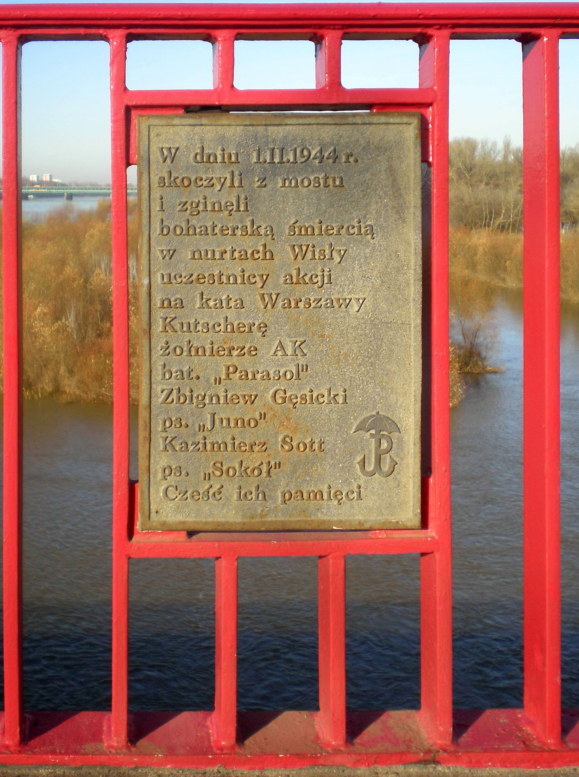 Tablica upamiętniająca Zbigniewa Gęsickiego "Junę" i Kazimierza Sotta "Sokoła", którzy skoczyli z mostu Kierbedzia uciekając przed pogonią po akcji Kutschera – tablica znajduje się na barierce mostu Śląsko-Dąbrowskiego.